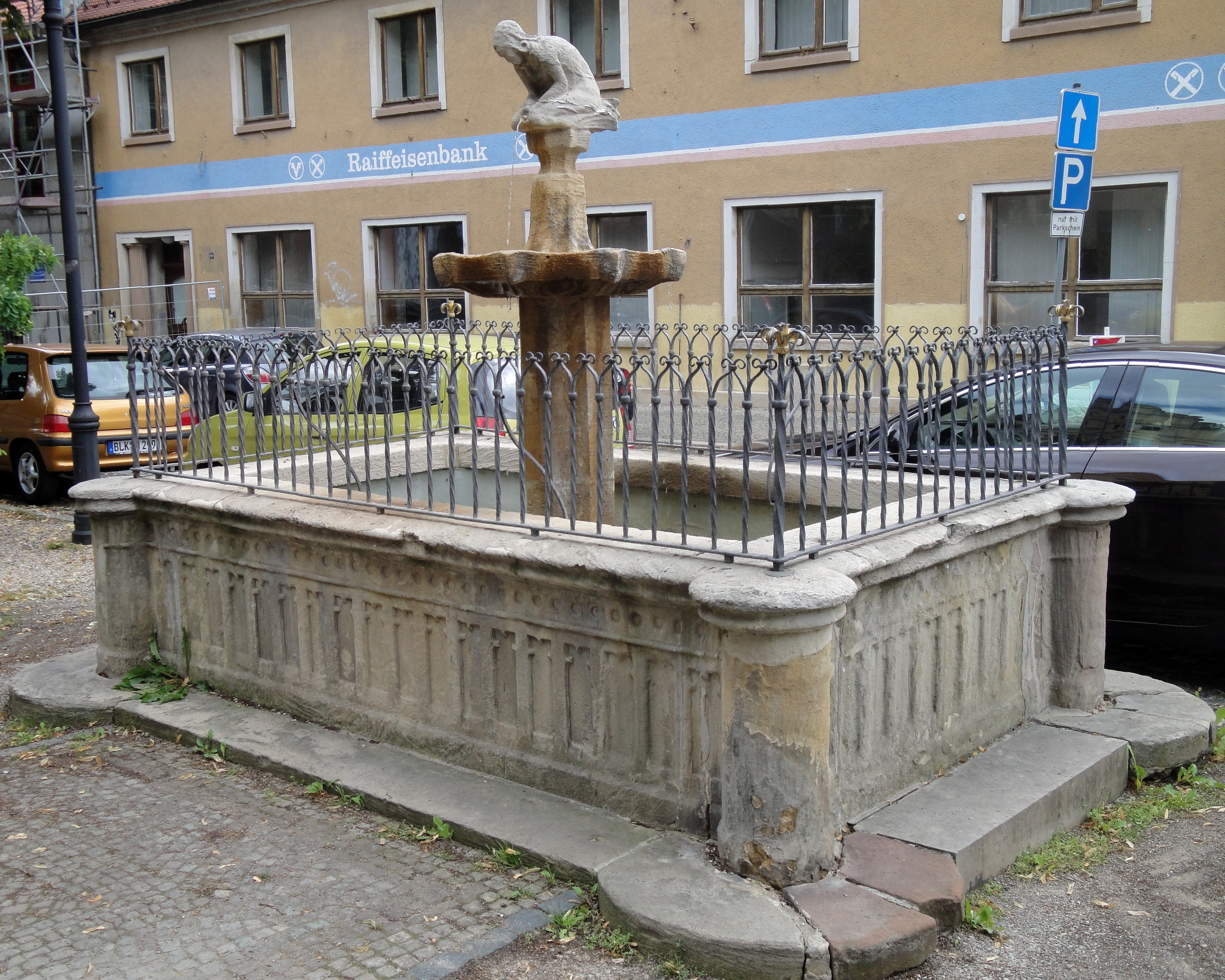 Springbrunnen, Naumburg (Saale)